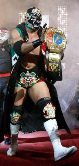 Dr Wagner Jr. Primer Campeon Latinoamericano de la triple A